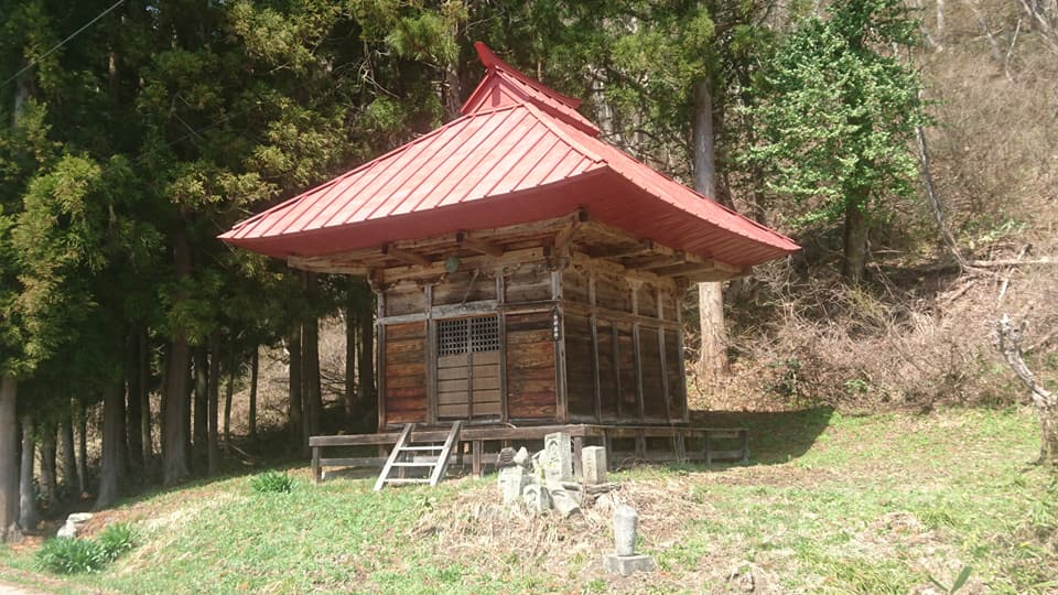 阿部薬師（奥州安倍氏の末裔）